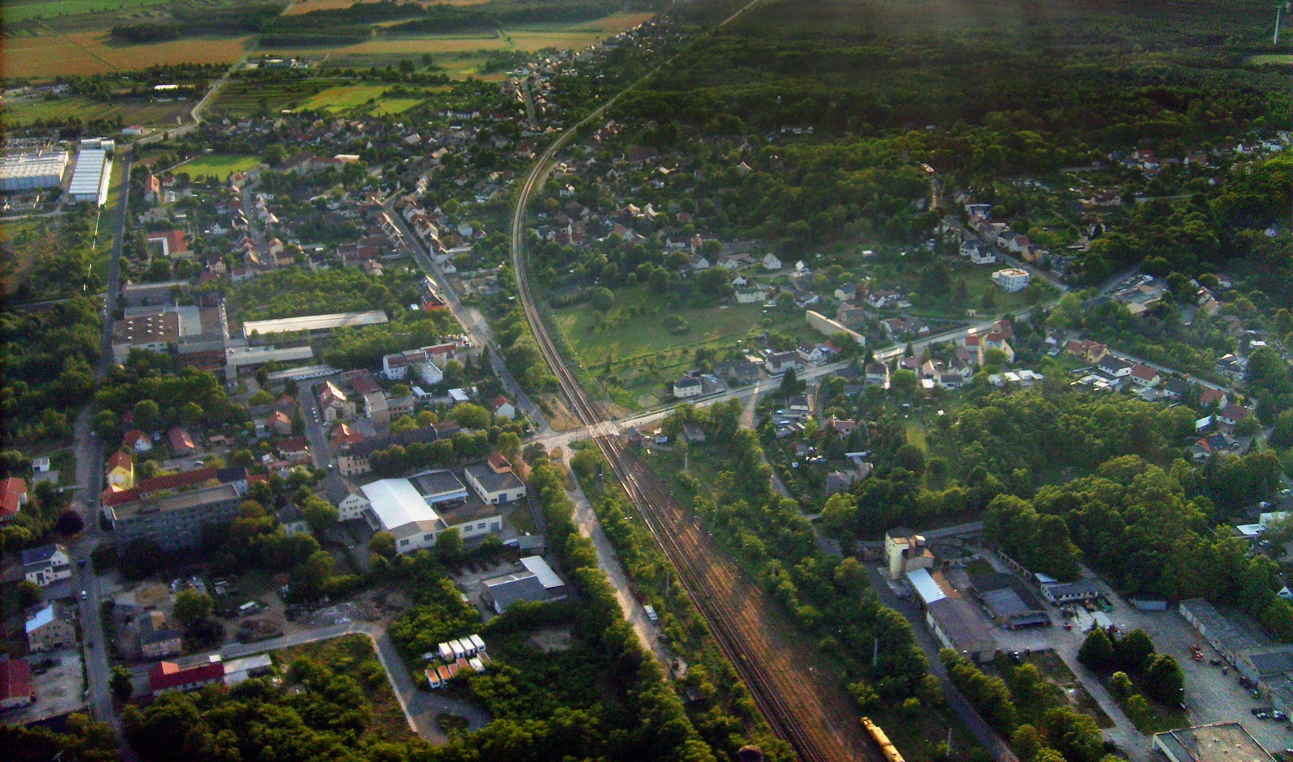 Biehla